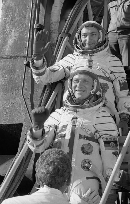 Waleri Bykowski und Sigmund Jähn ADN-ZB/Franke/26.8.78/UdSSR: Kosmos/ Sojus 31/ Baikonur/ Am 26.8.78 wurde in der Sowjetunion das Raumschiff Sojus 31 gestartet. Zur Besatzung gehören der Kommandant des Raumschiffes Oberst Waleri Bykowski (oben), und der Forschungskosmonaut Oberstleutnant Sigmund Jähn, aus der DDR. Vor dem Start winken die Kosmonauten ein letztes Mal zurück. Abgebildete Personen: Jähn, Sigmund: Kosmonaut des Raumschiffes Sojus 31, DDR GND 118556533 Bykowski, Waleri: Oberst, Kosmonaut, Kommandant der Sojus 31, Sowjetunion